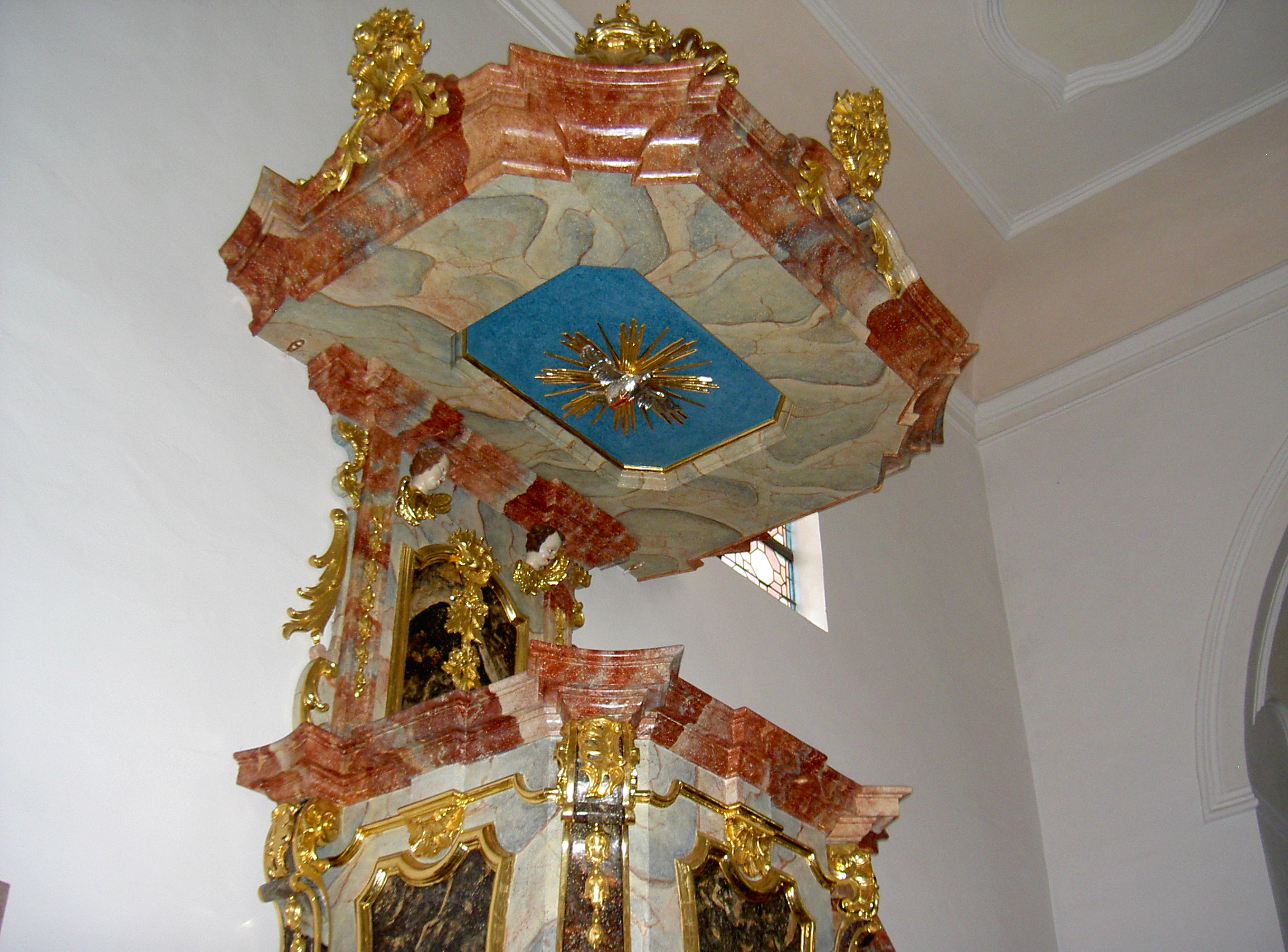 Kirche St. Peter und Paul (Kößing)